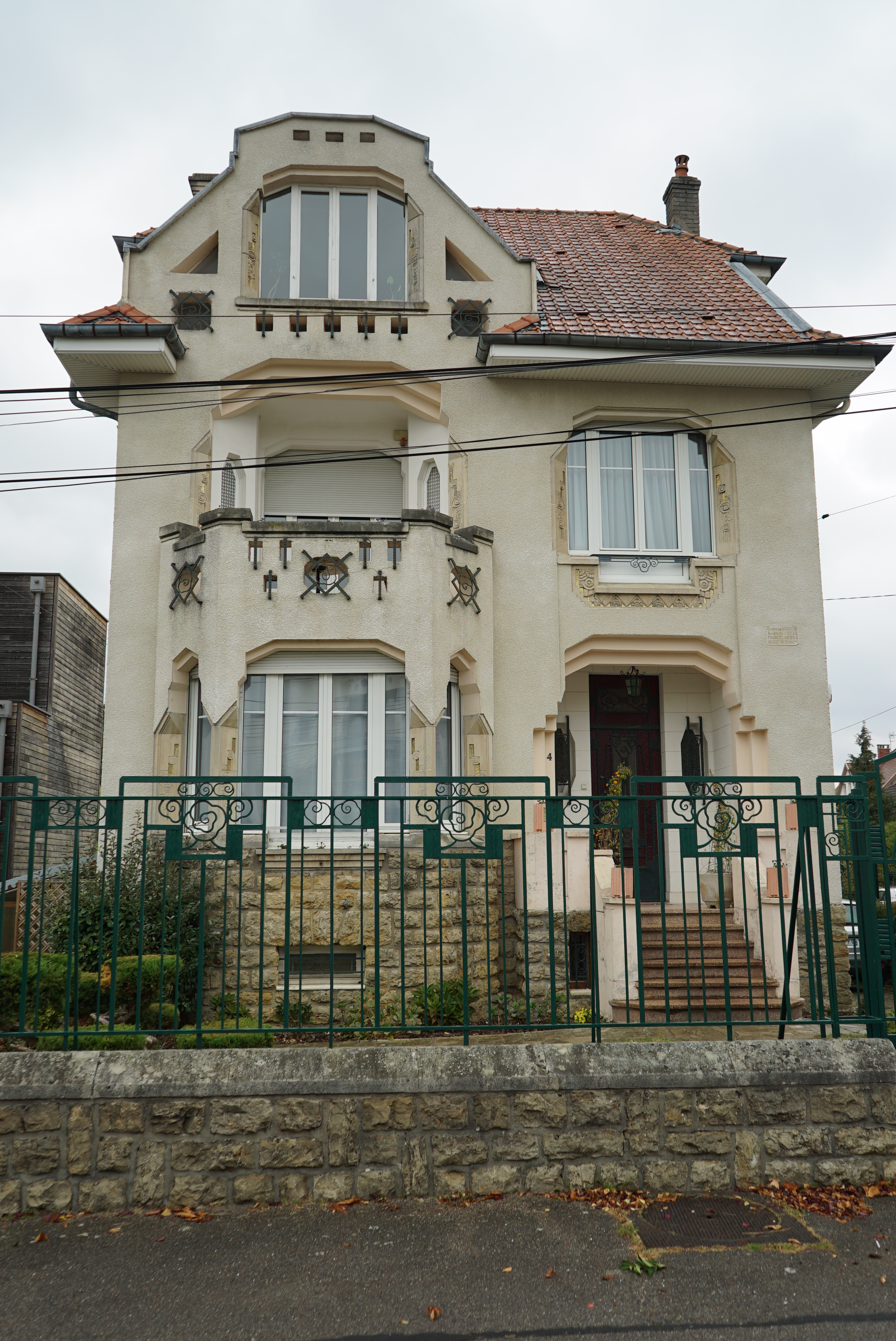 villa bâtie par Charles Masson, 1932, à Villers-lès-Nancy.